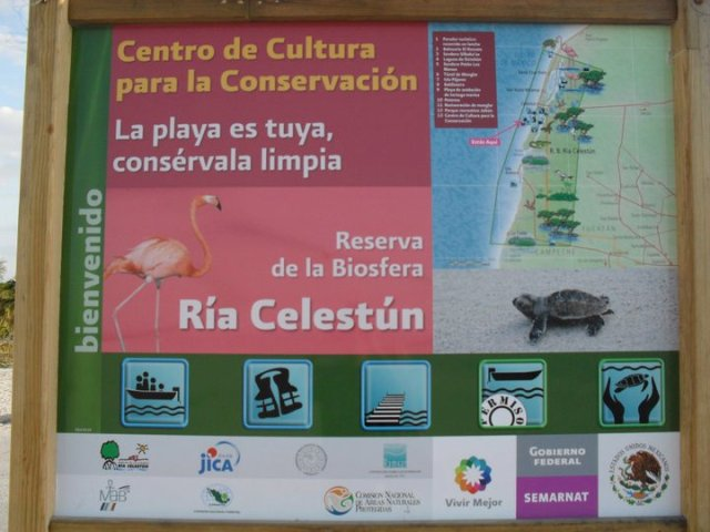 riserva di celestun